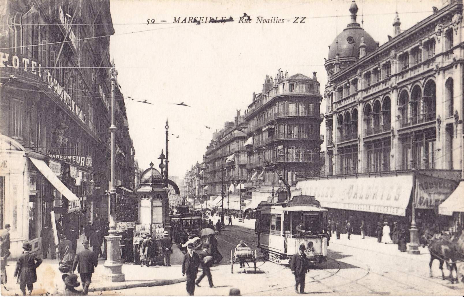 Carte postale ancienne éditée par ZZ : MARSEILLE - Rue Noailles